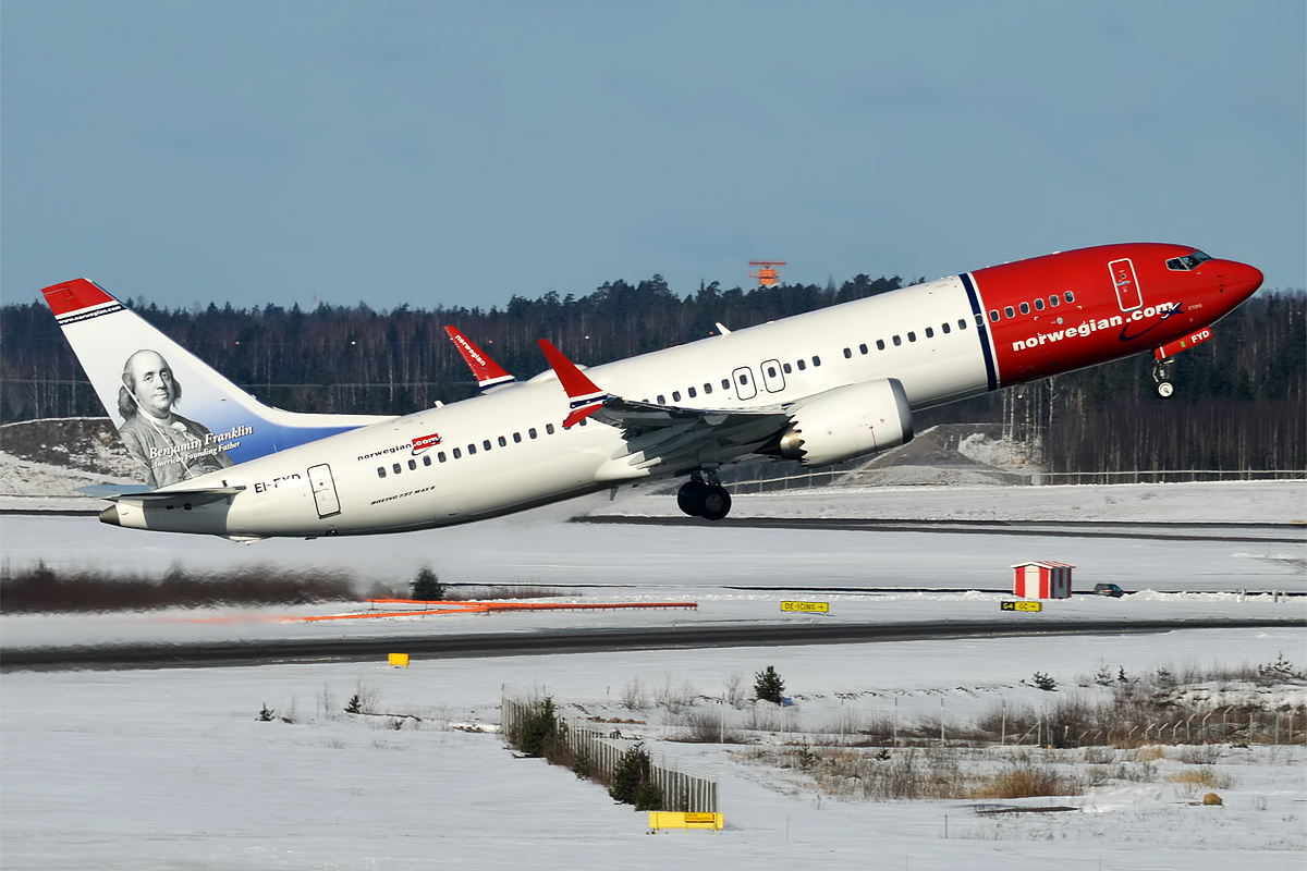 Norwegian (Benjamin Franklin livery), EI-FYD, Boeing 737-8 MAX